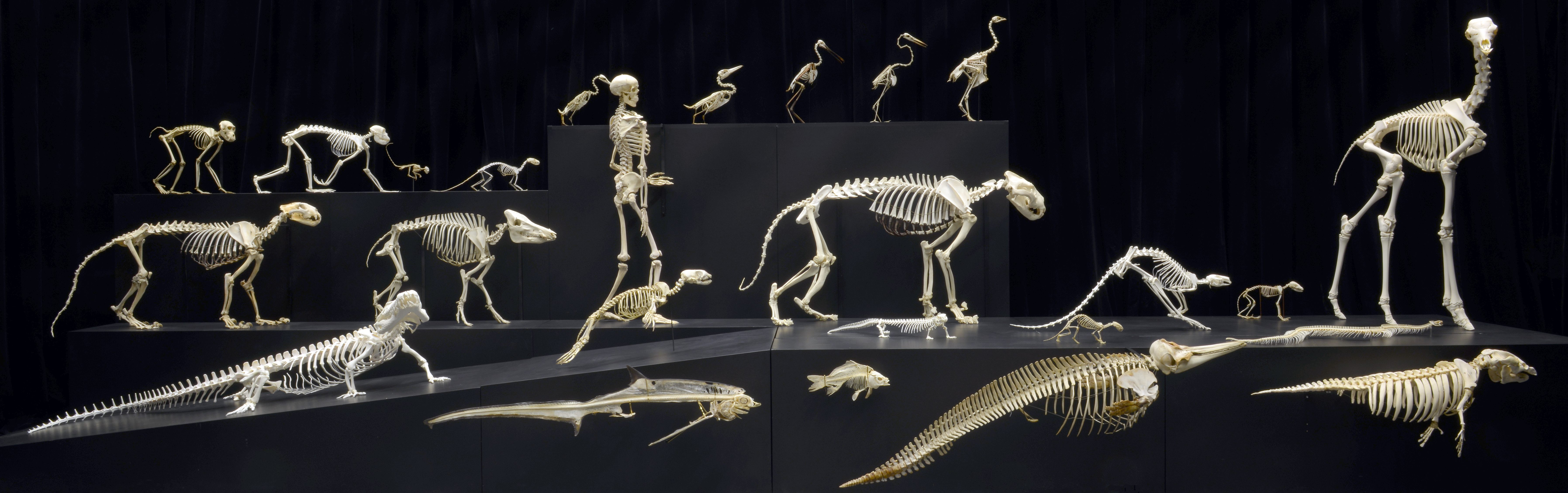 Présentation de squelettes dans l'exposition "Parce Queue" ; Sanglier, Lion, Dauphin, Homme (moulage), Panthère, Magot, Ouistiti, Carpe, Lamentin, Wallaby